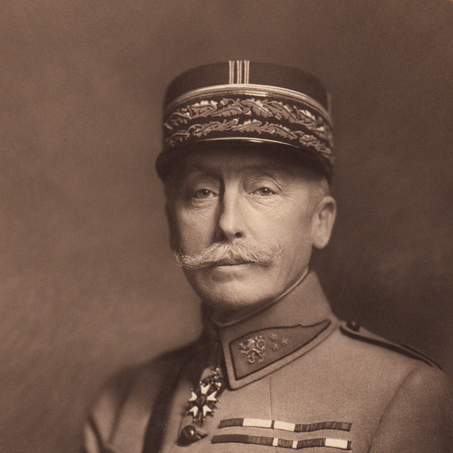 Portrait du Général Pellé